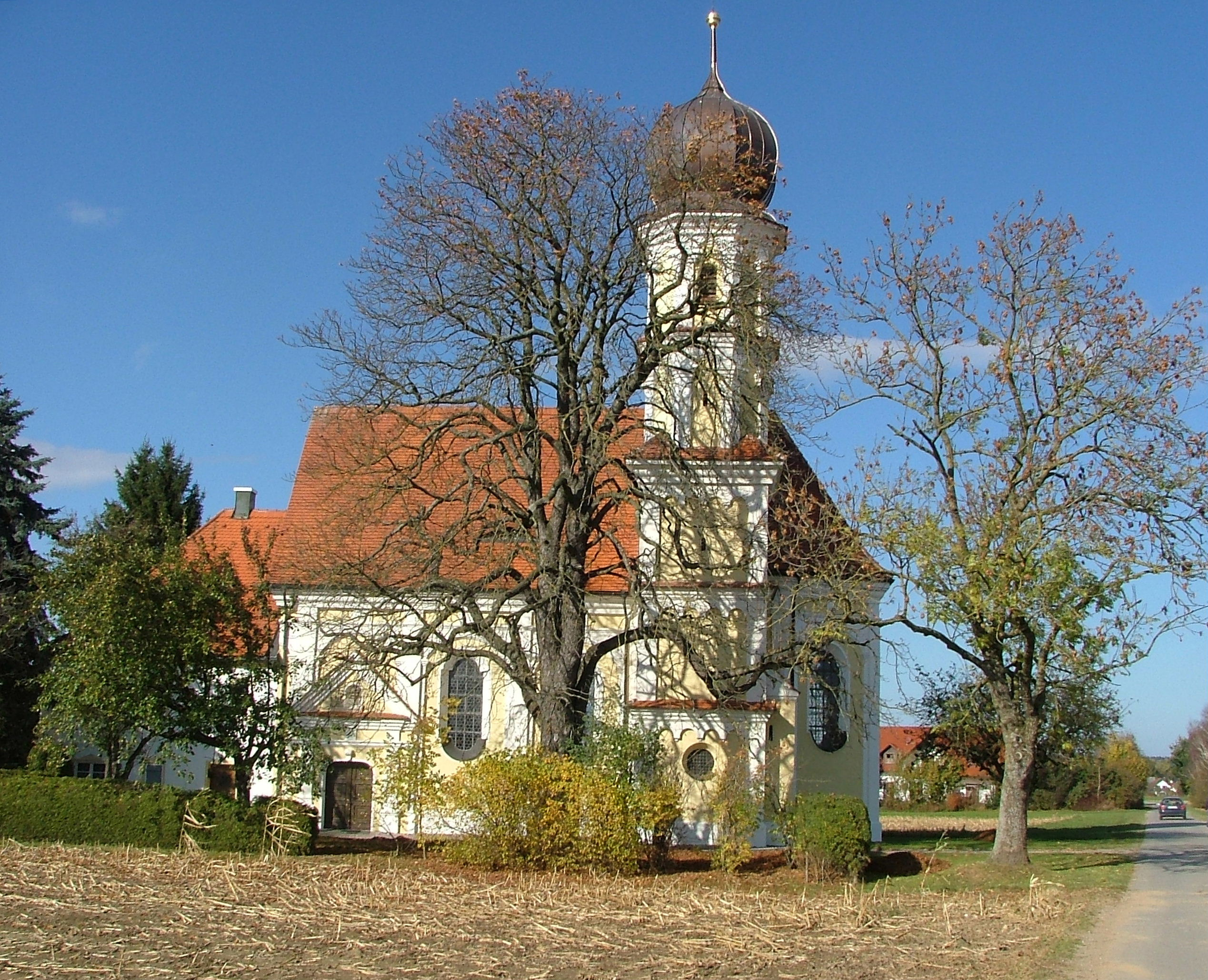 Kreuzkirche